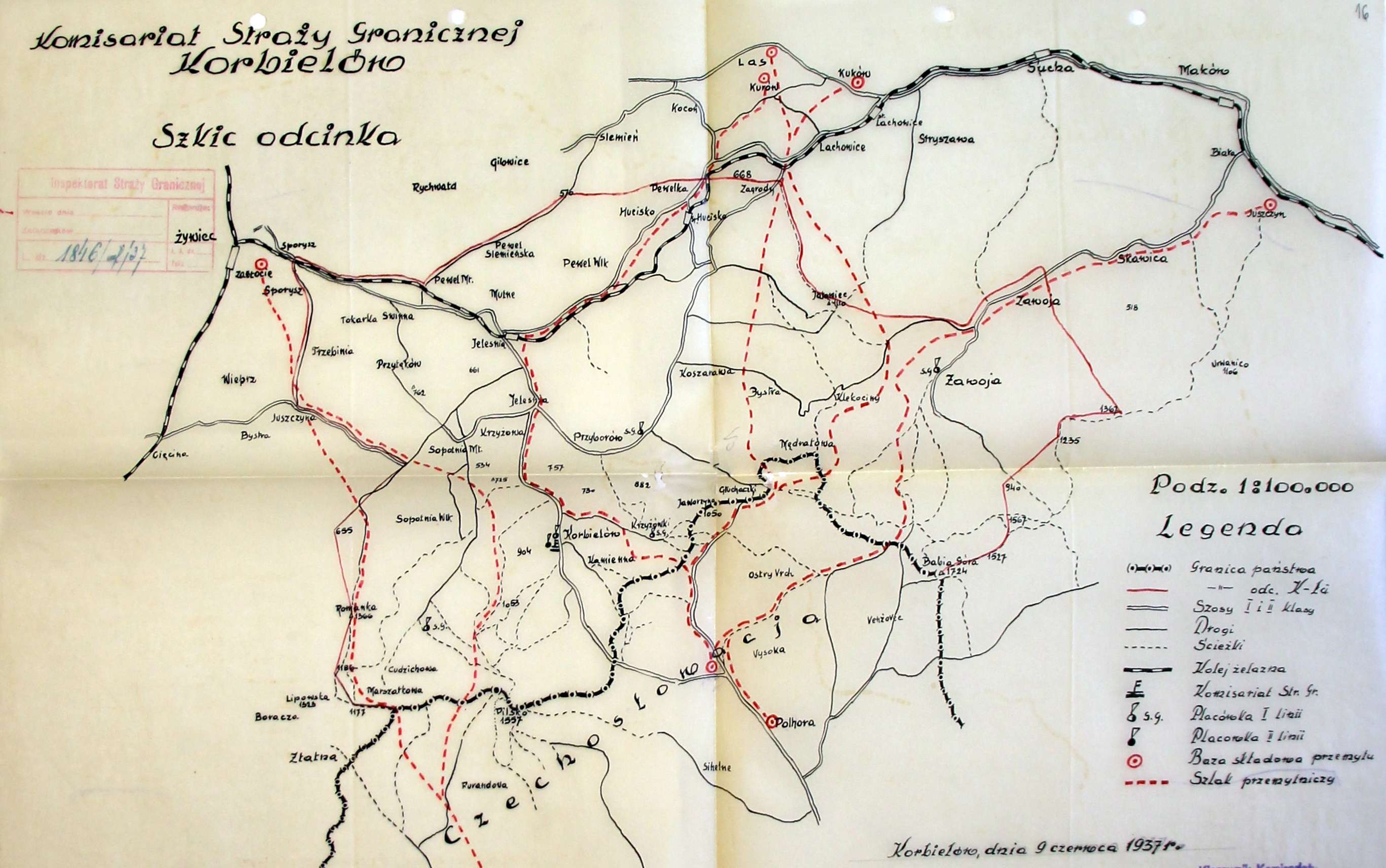 Szkic komisariatu SG Korbielów - lata 30. XX wieku